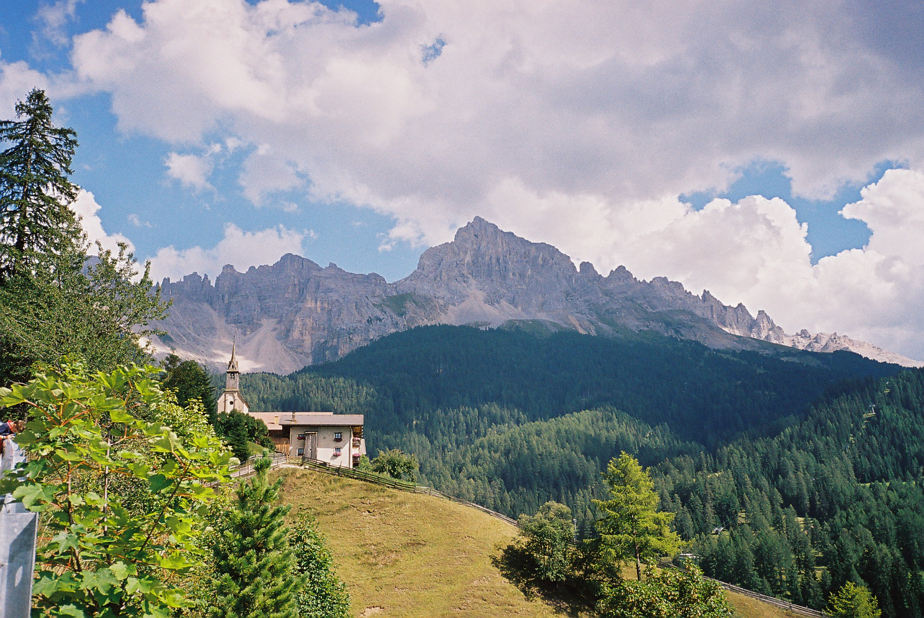 Latemar vanuit San Floriano (Italië) in 2004. Eigen werk, vrij voor het publiek. Categorie:Afbeelding landschap